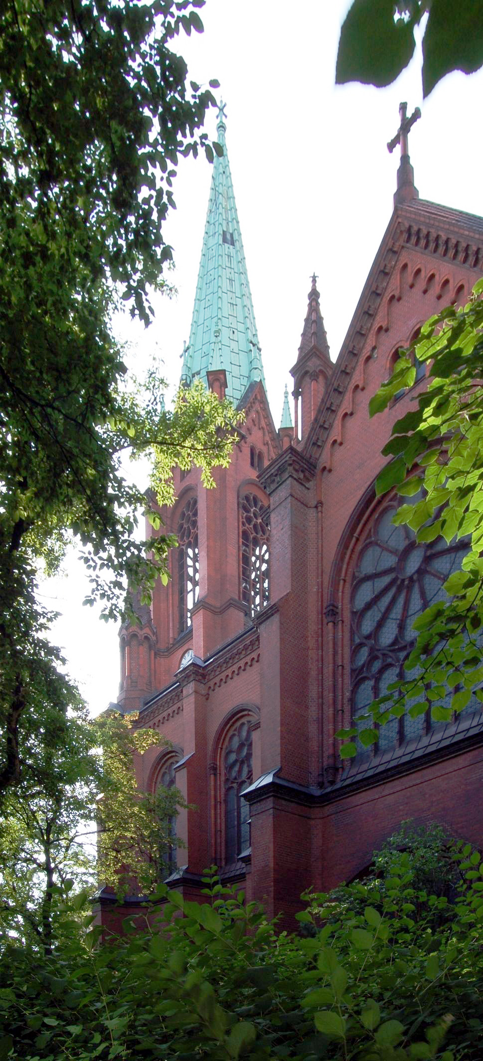 Die Gethsemanekirche (Berlin). Das Photo entstand am 20. Juni 2006. Es wurde mit einer Nikon D50 mit Nikkor 15-55mm Objektiv photographiert. Ich veröffentliche unter den Bedingungen der GFDL (GNU-Lizenz für freie Dokumentation).